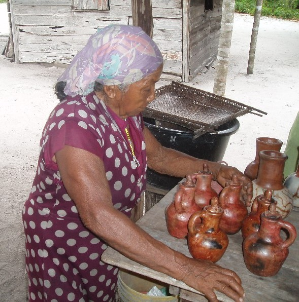 Cabendadorp (Suriname): mevrouw Toenae met haar keramiek. Foto: Els Moor. Toestemming voor publicatie in publiek domein.